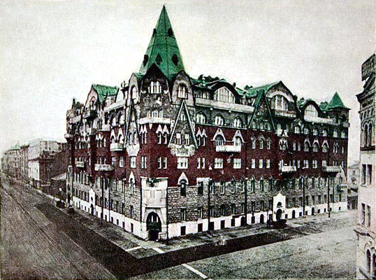 "Дом-Сказка". Доходный дом золотопромышленника Петра Колцова